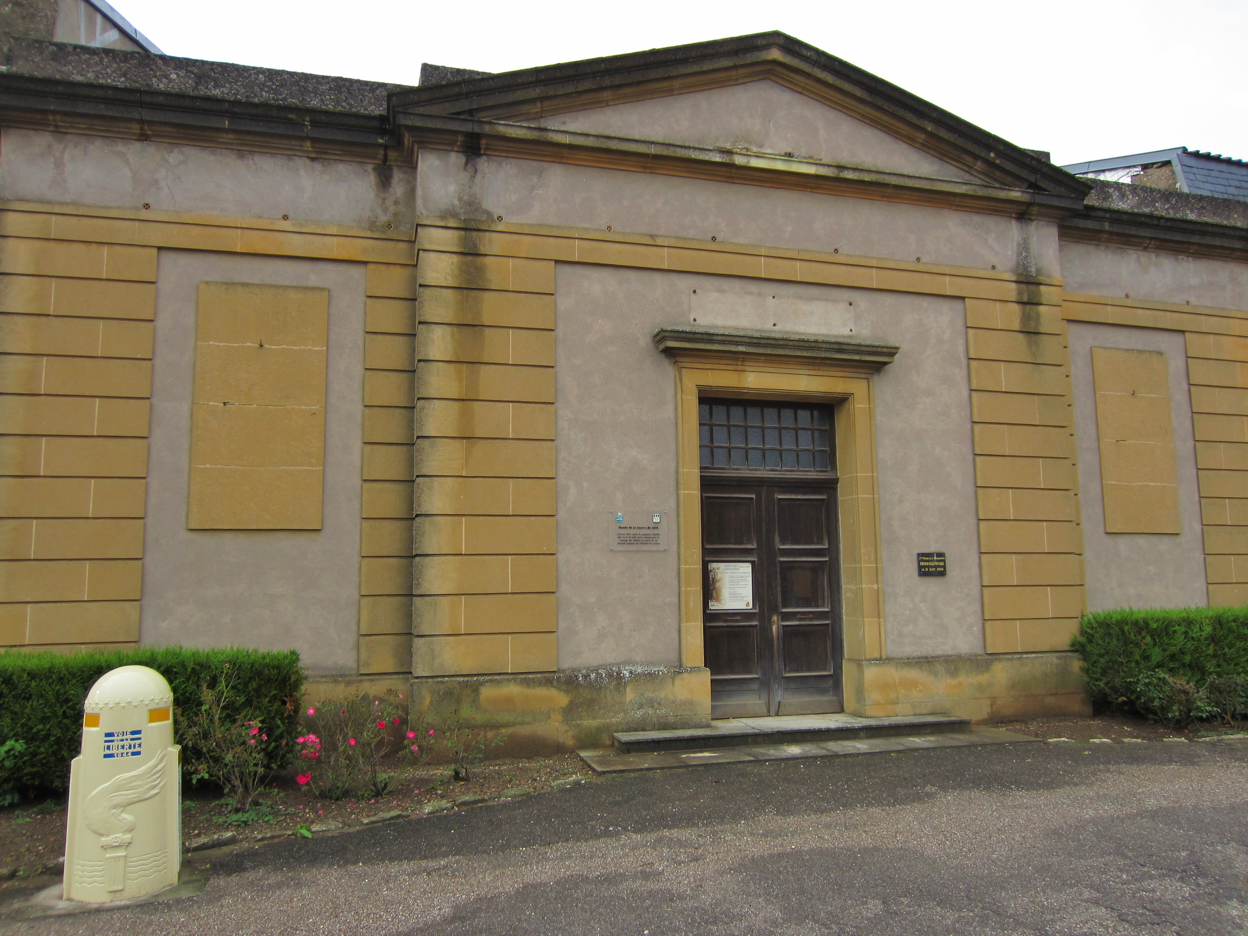 Description ancien musée militaire Gravelotte Date12 September 2011Sourcemon appareil photoAuthorAimelaimePermission (Reusing this file) ancien musée militaire Gravelotte